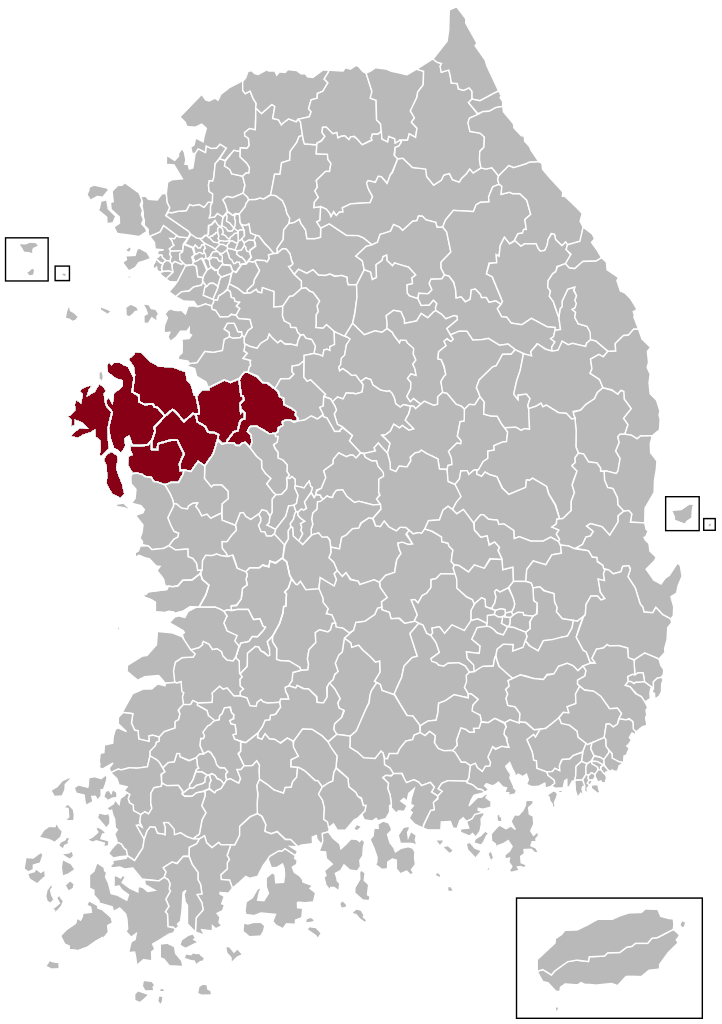 천안우편집중국 관할구역 지도